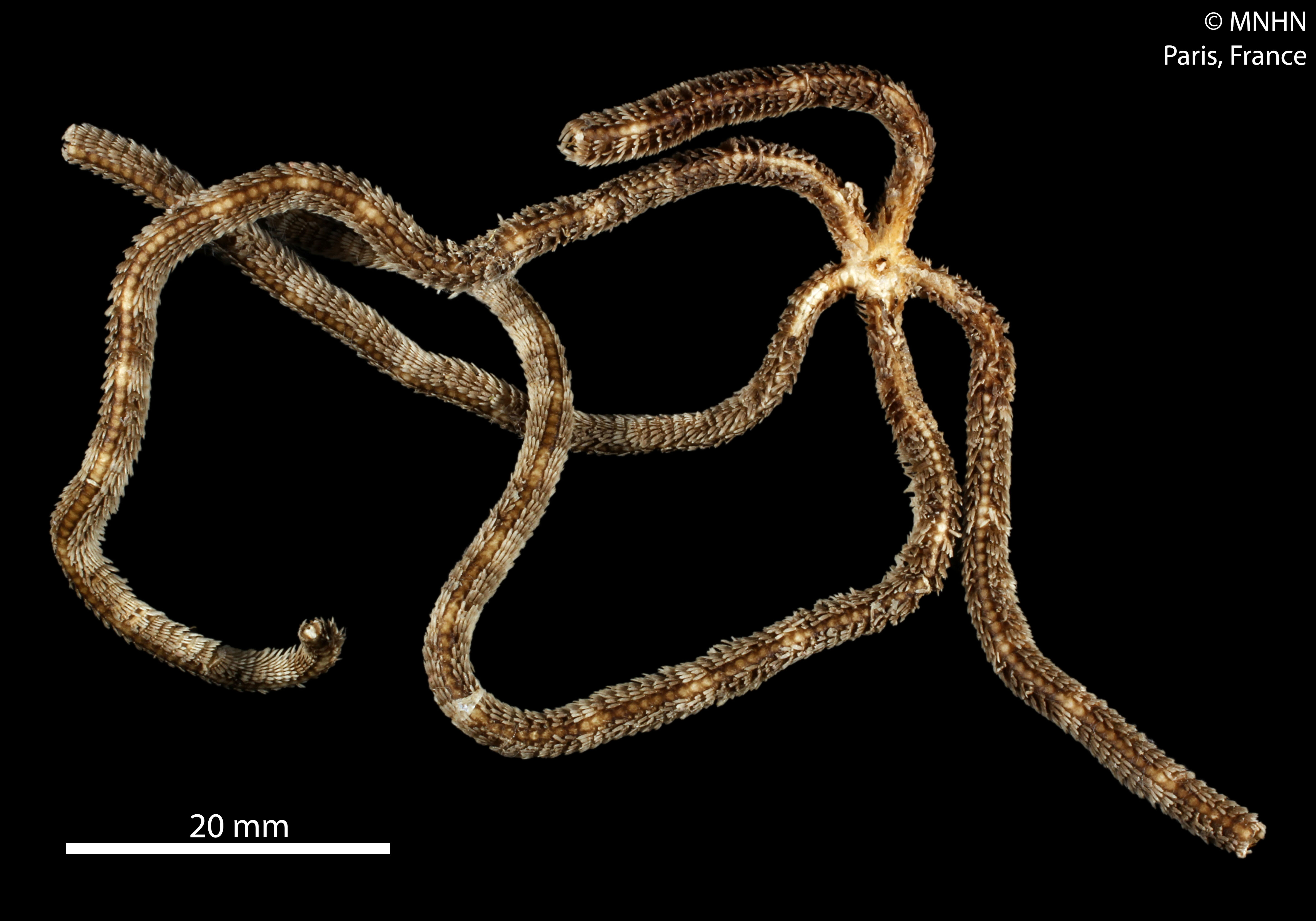 Ophiopsila multipapillata Guille & Jangoux, 1978 - HOLOTYPESpécimen MNHN-IE-2013-10291Collection : Échinodermes (IE)Muséum National d'Histoire Naturelle (Paris, France) Origine : Libellé du pays : INDONESIE Localité/Lieu-dit : Baie d'Amboine Localité originale : Moluques du Sud Nom du collecteur : Jangoux M.